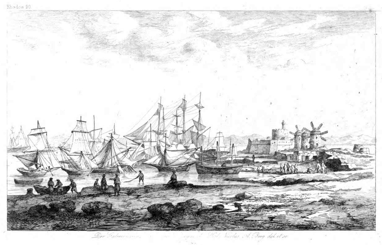 from: Albert Berg Die Insel Rhodus, aus eigener Anschauung und nach den vorhandenen Quellen historisch, geographisch, archäologisch, malerisch beschrieben und durch Originalradierungen und Holzschnitte nach eigenen Naturstudien und Zeichnungen illustrirt (1861) Der Galeerenhafen, Schoss und Damm des heiligen Nicolas